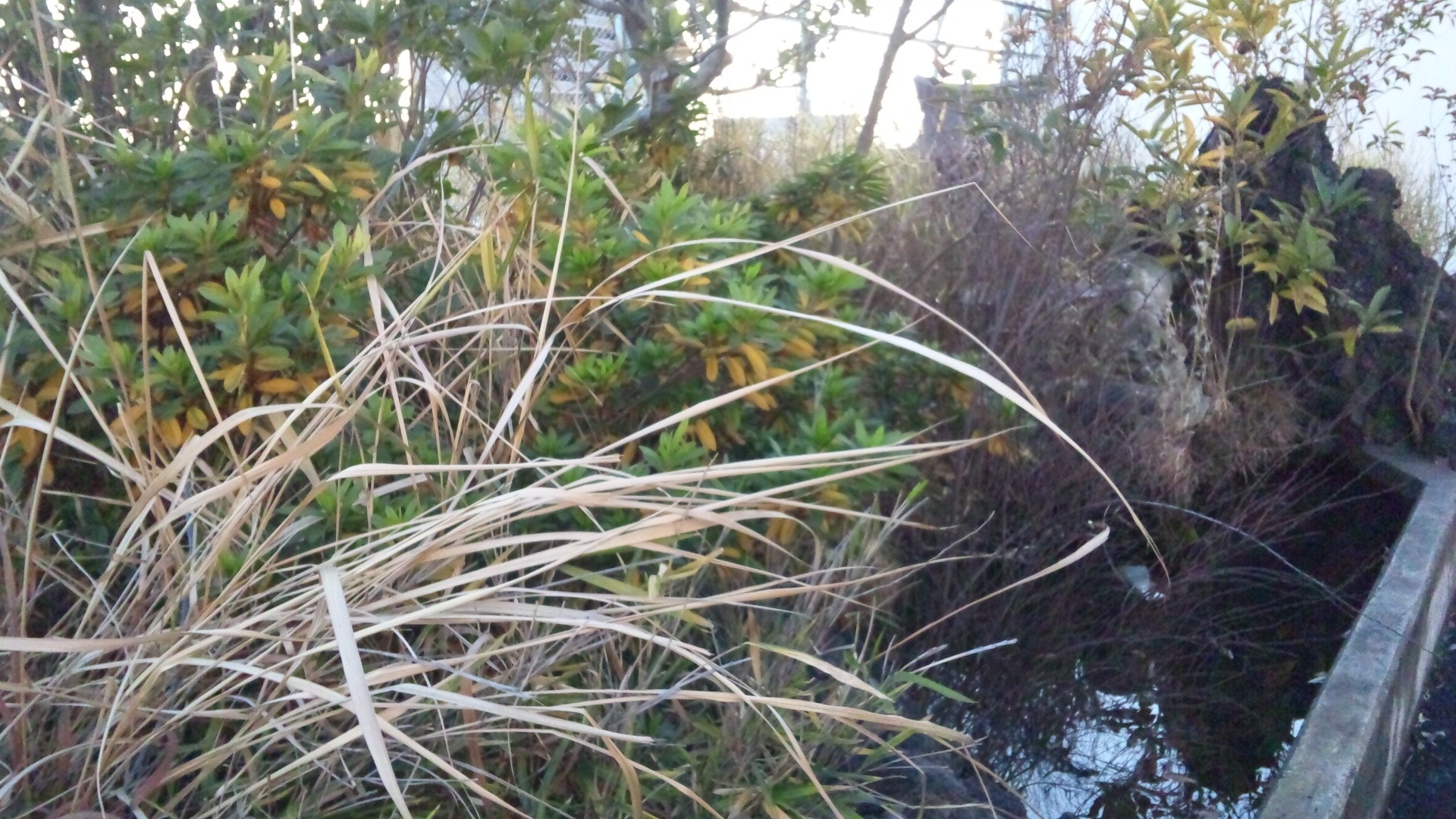 現在の鏡ヶ池：栃木県宇都宮市馬場通り2－3－12 ラパーク長崎屋屋上